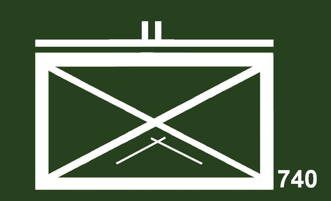 Sicherungsbataillon